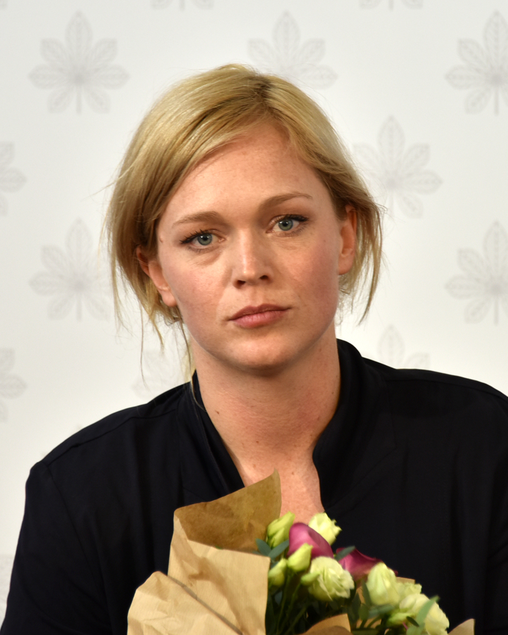 Ester Geislerová (2019)